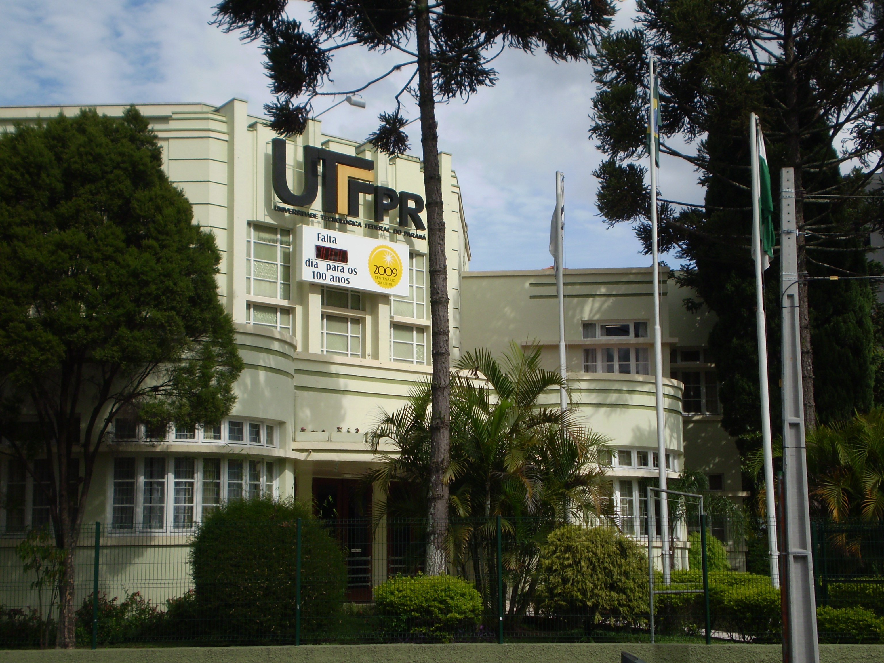 UTFPR em 23 de setembro de 2009 nos 100 anos da instituição